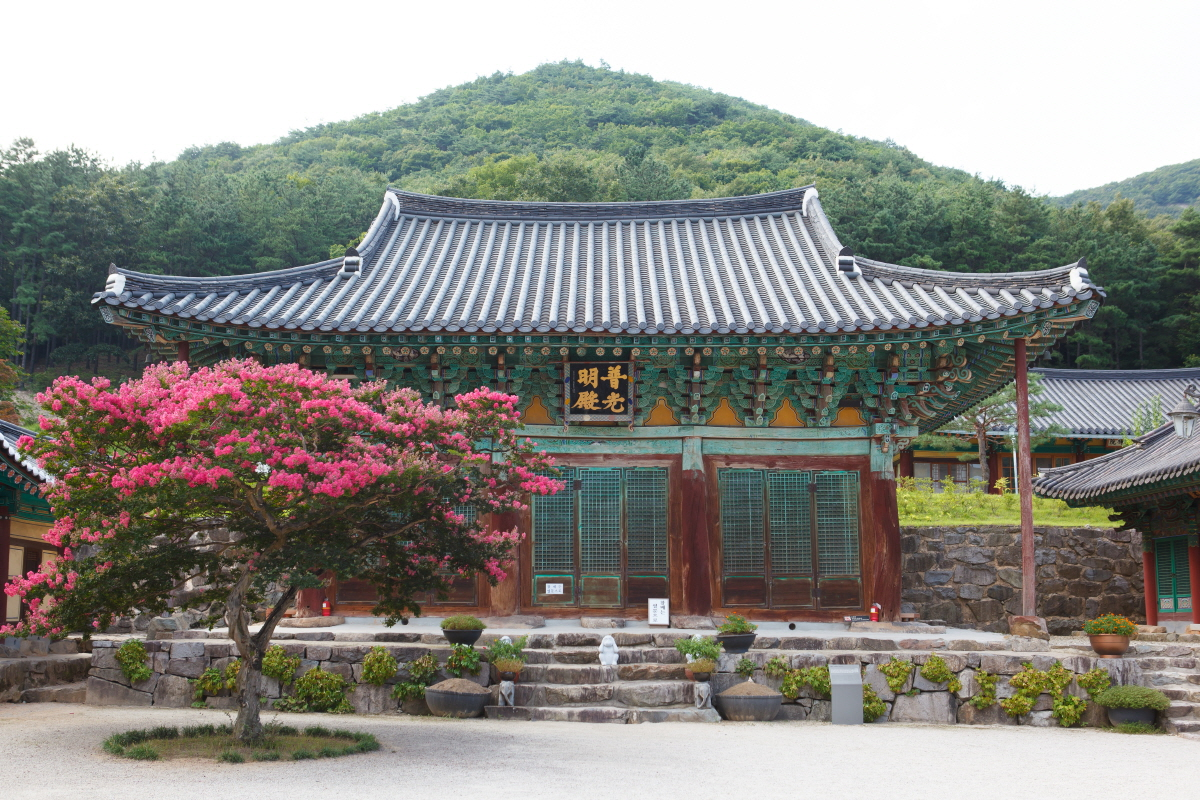 보물 제608호 완주 위봉사 보광명전 (完州 威鳳寺 普光明殿) - 보광명전 정면